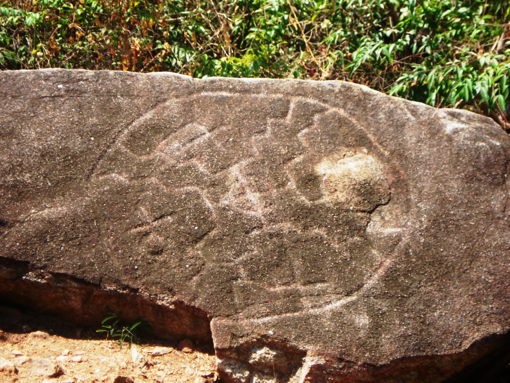 Elemento Nº 10 de la zona arqueológica de Palma Sola en Acapulco, Guerrero, México.